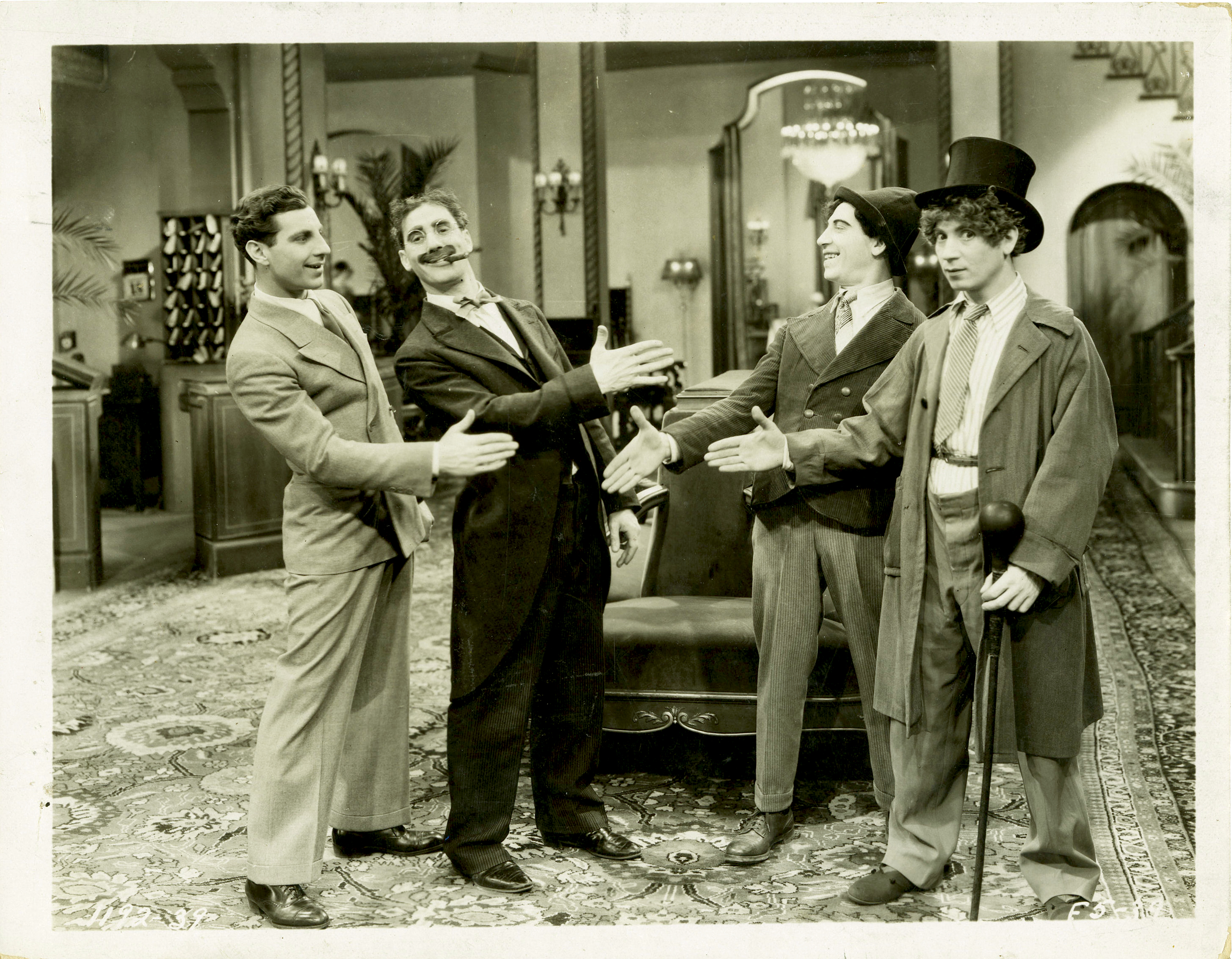 Promotional still